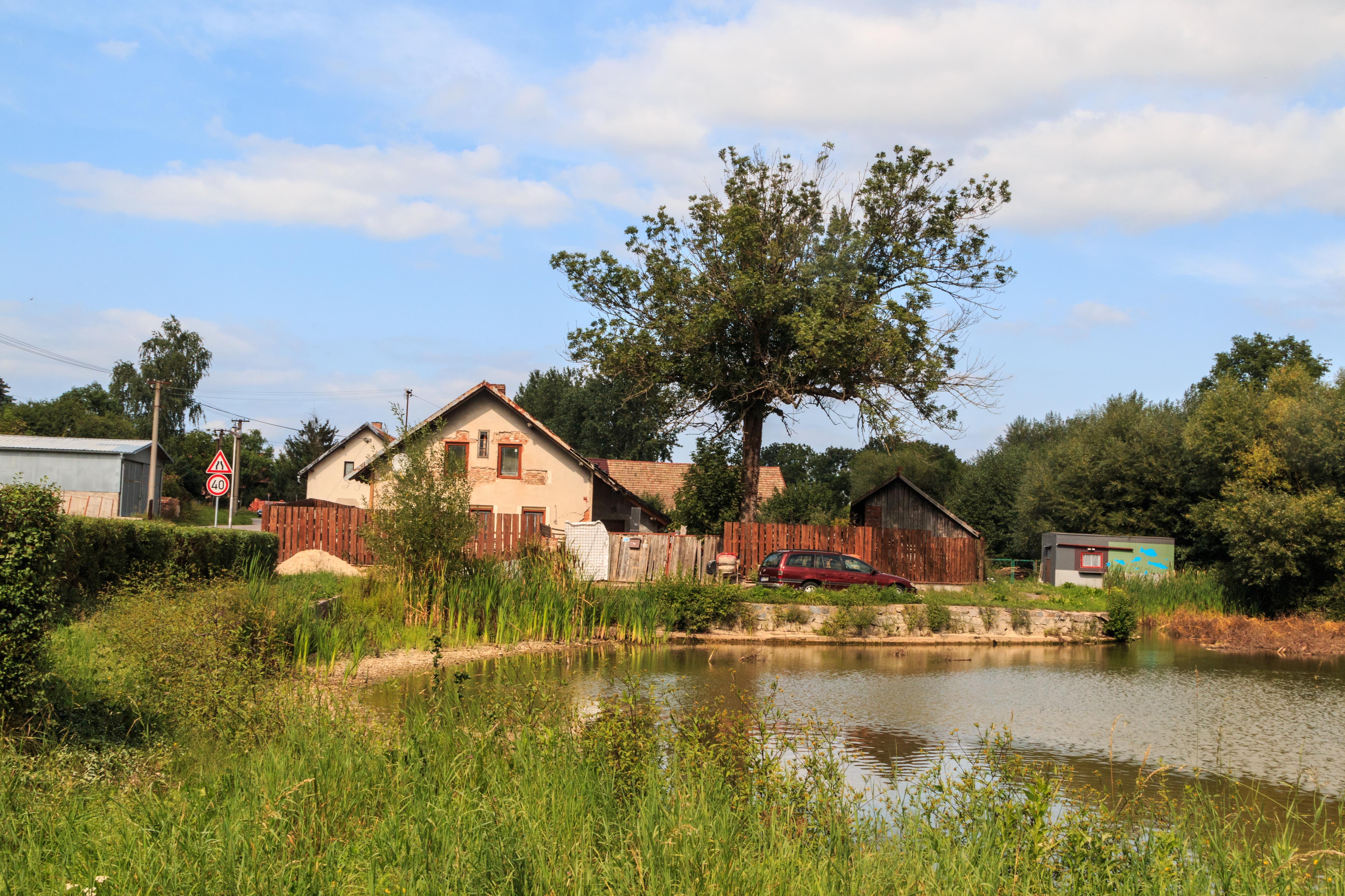 rybník v Uhersku